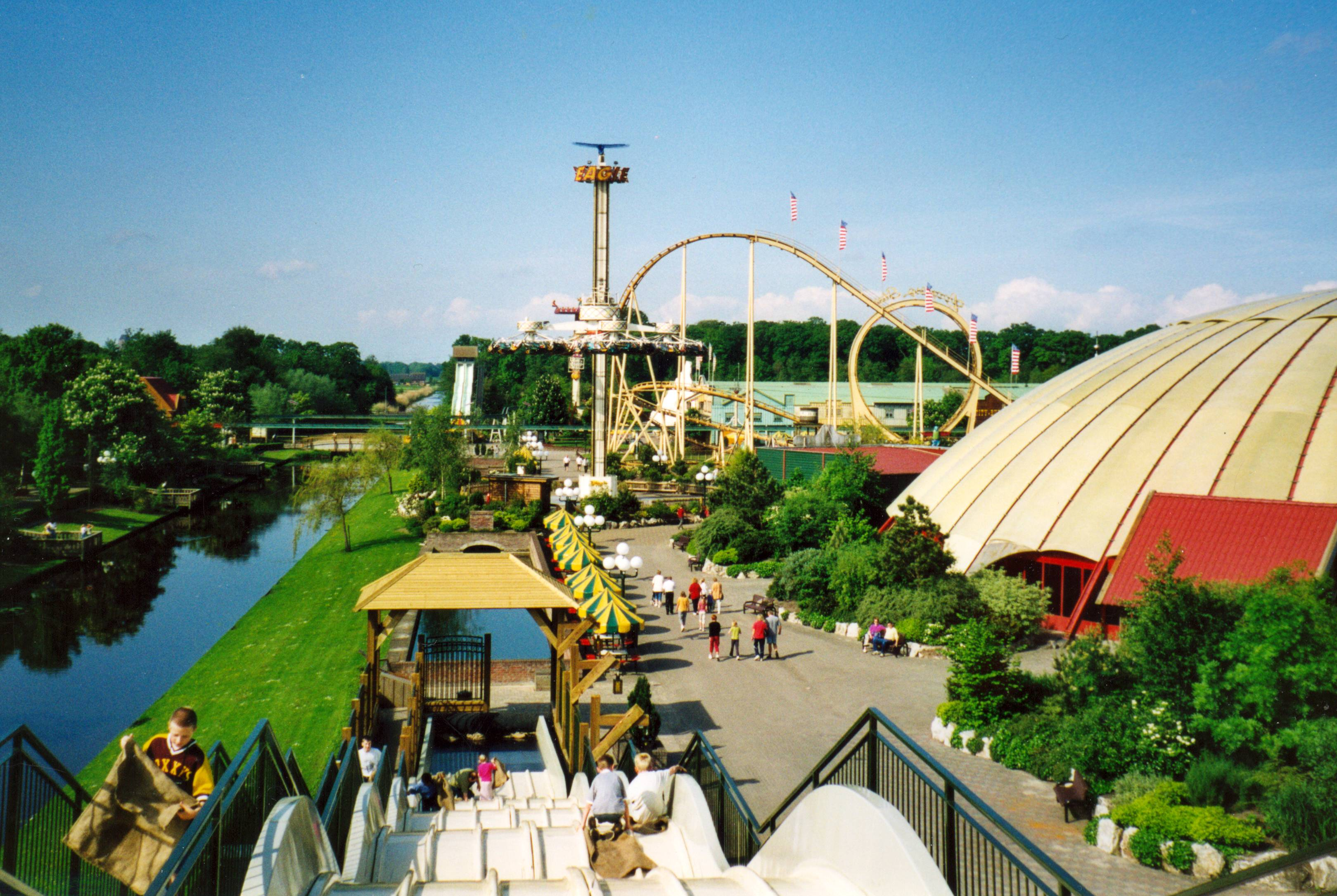 Attraciepark Slagharen; Netherlands